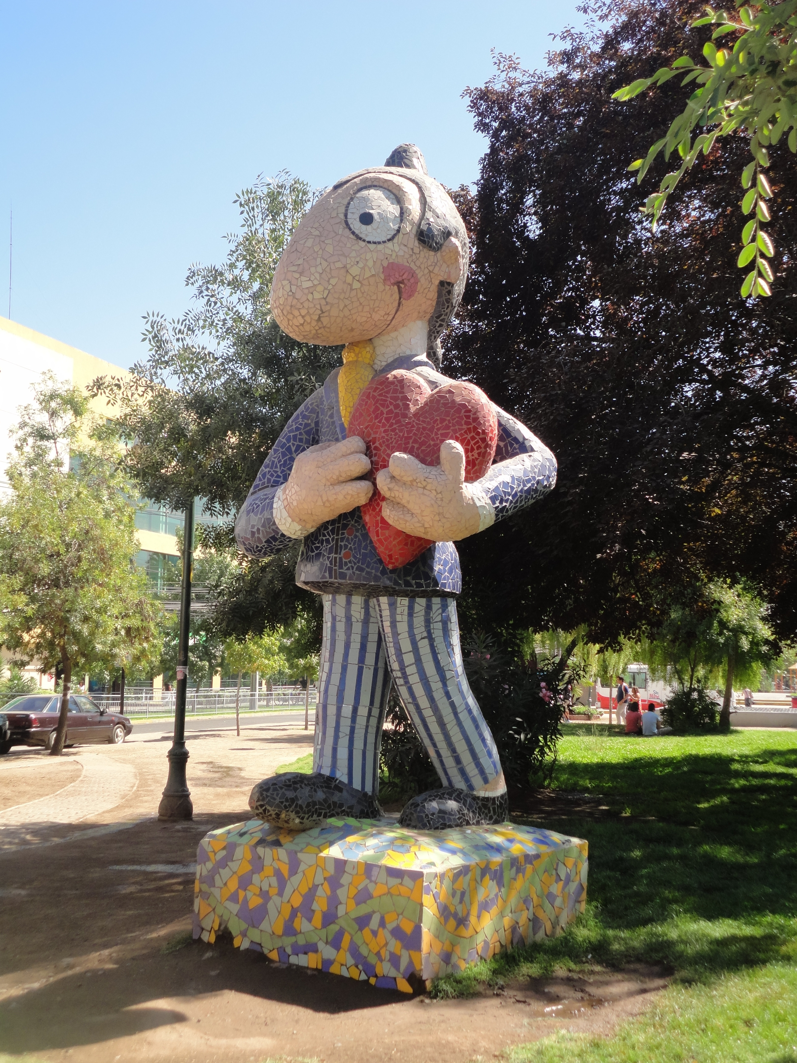 Estatua de Pepe Antártico en el Parque del Cómic en la comuna de San Miguel, Santiago de Chile